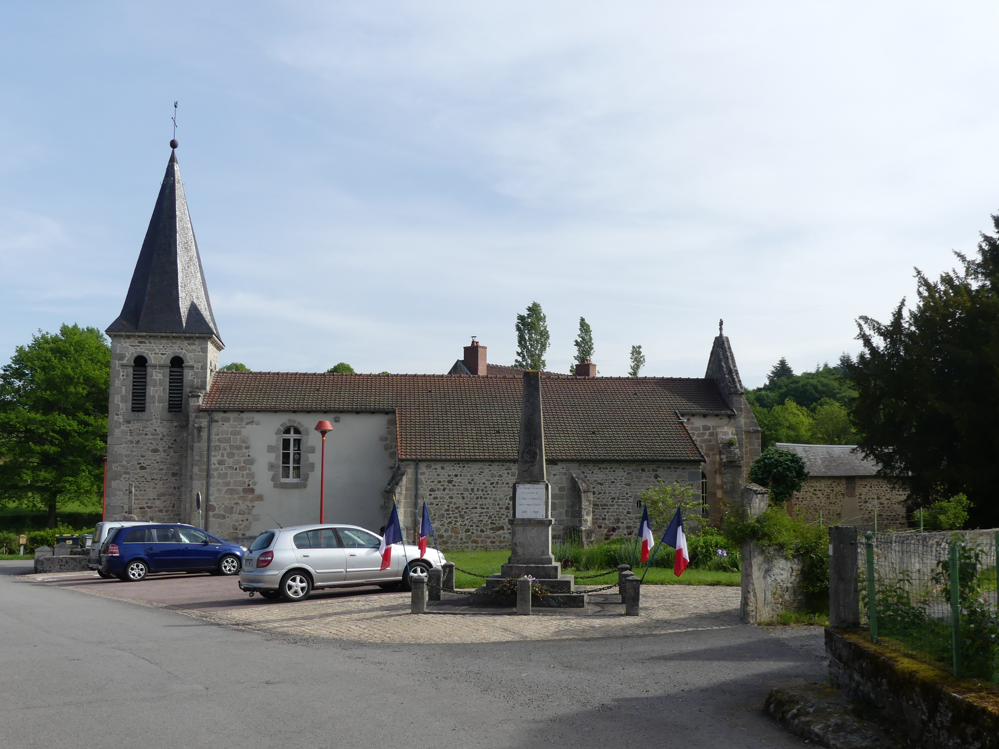 L'église et le monument aux morts de Saint-Marc-à-Frongier, Creuse, France.